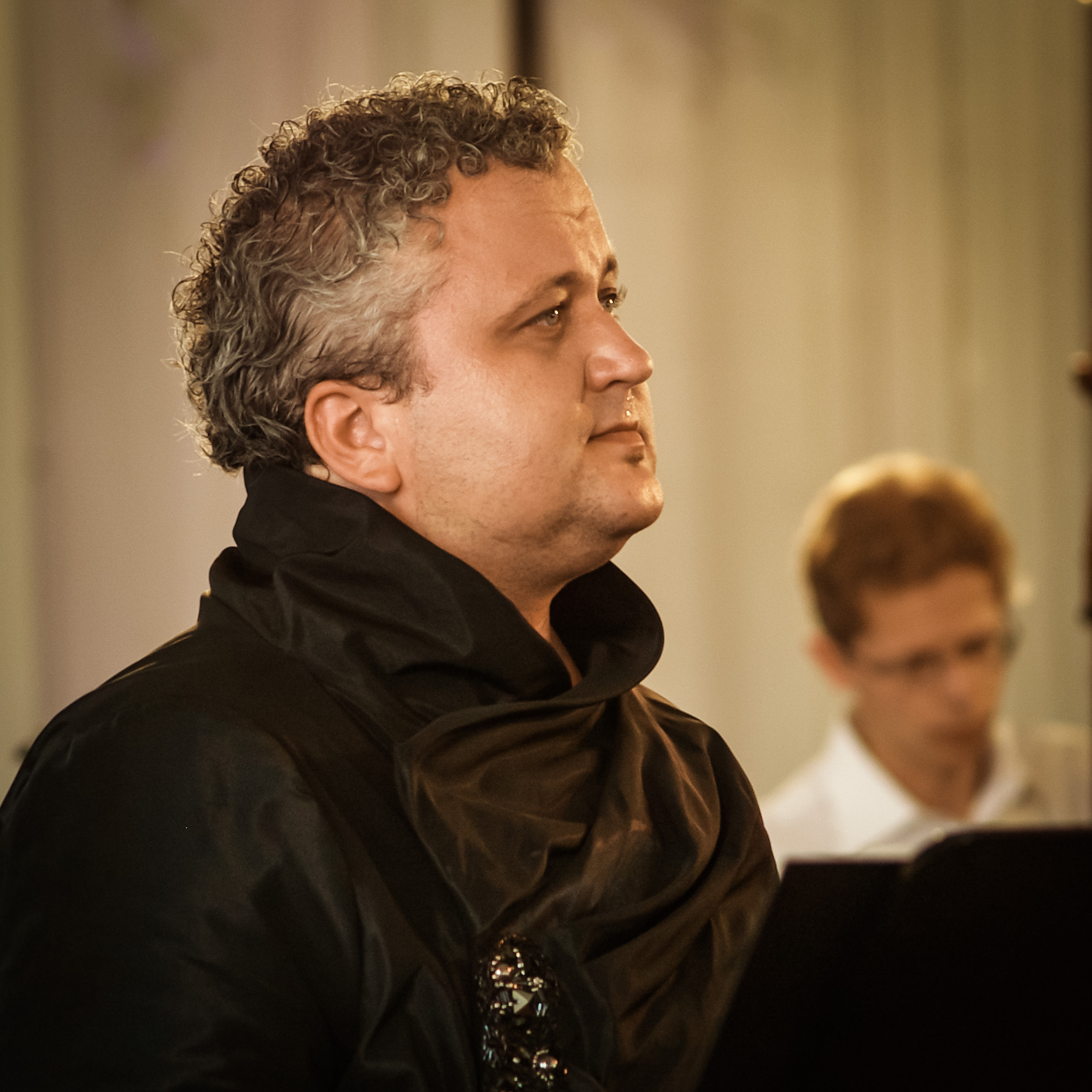 Sergejs Jēgers - dziedātājs un zināmākais kontrtenors Latvijā